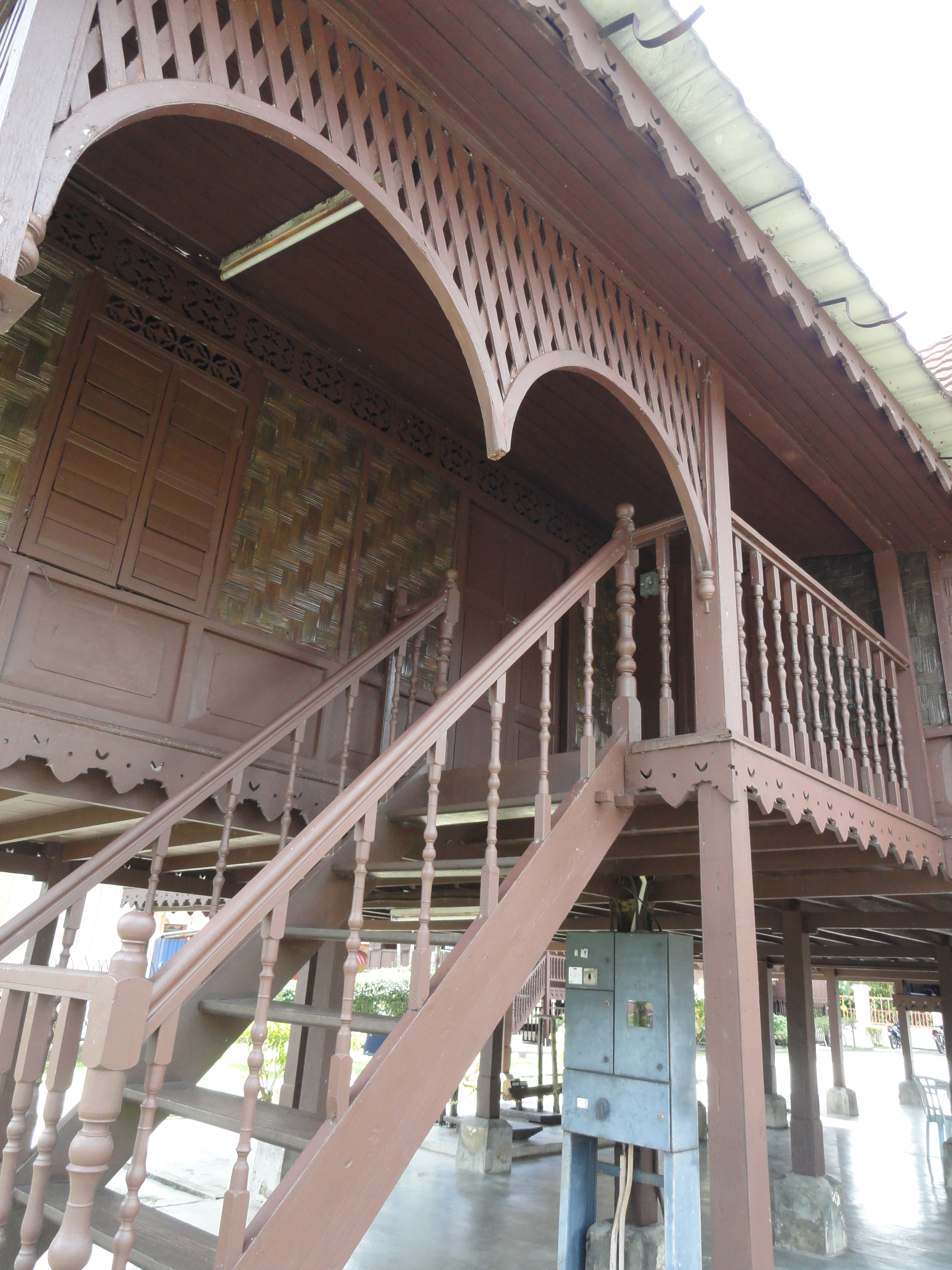 Malay Traditional House, Perak, Malaysia